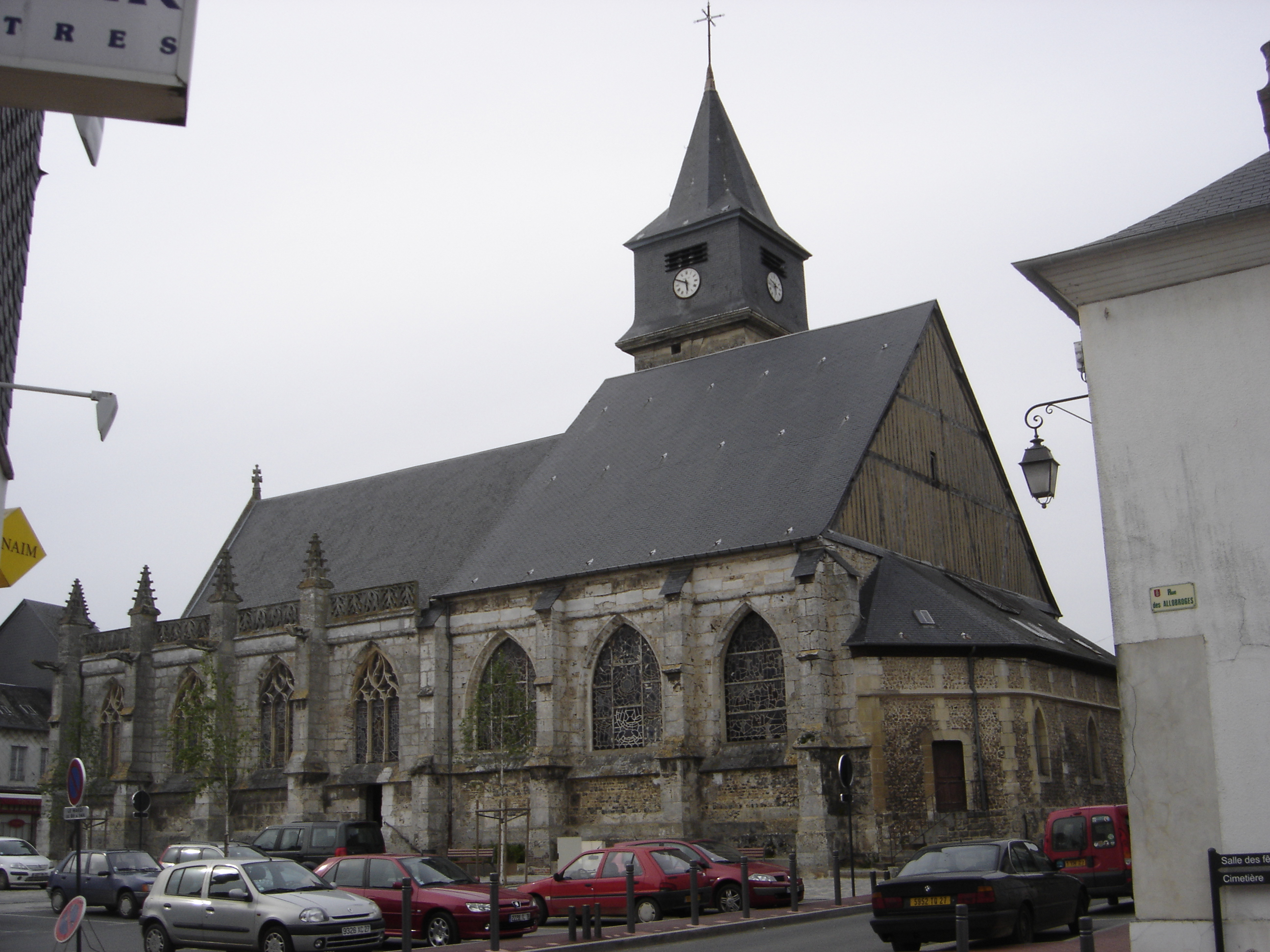 Eglise Saint-Hélier à Beuzeville - Eure - France